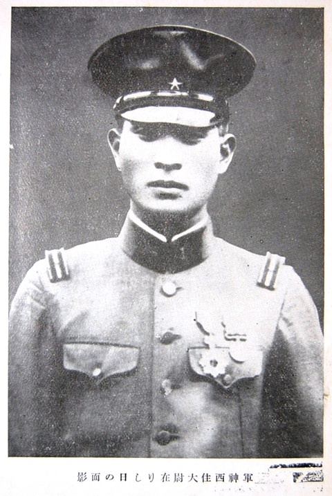 少尉時代の西住。